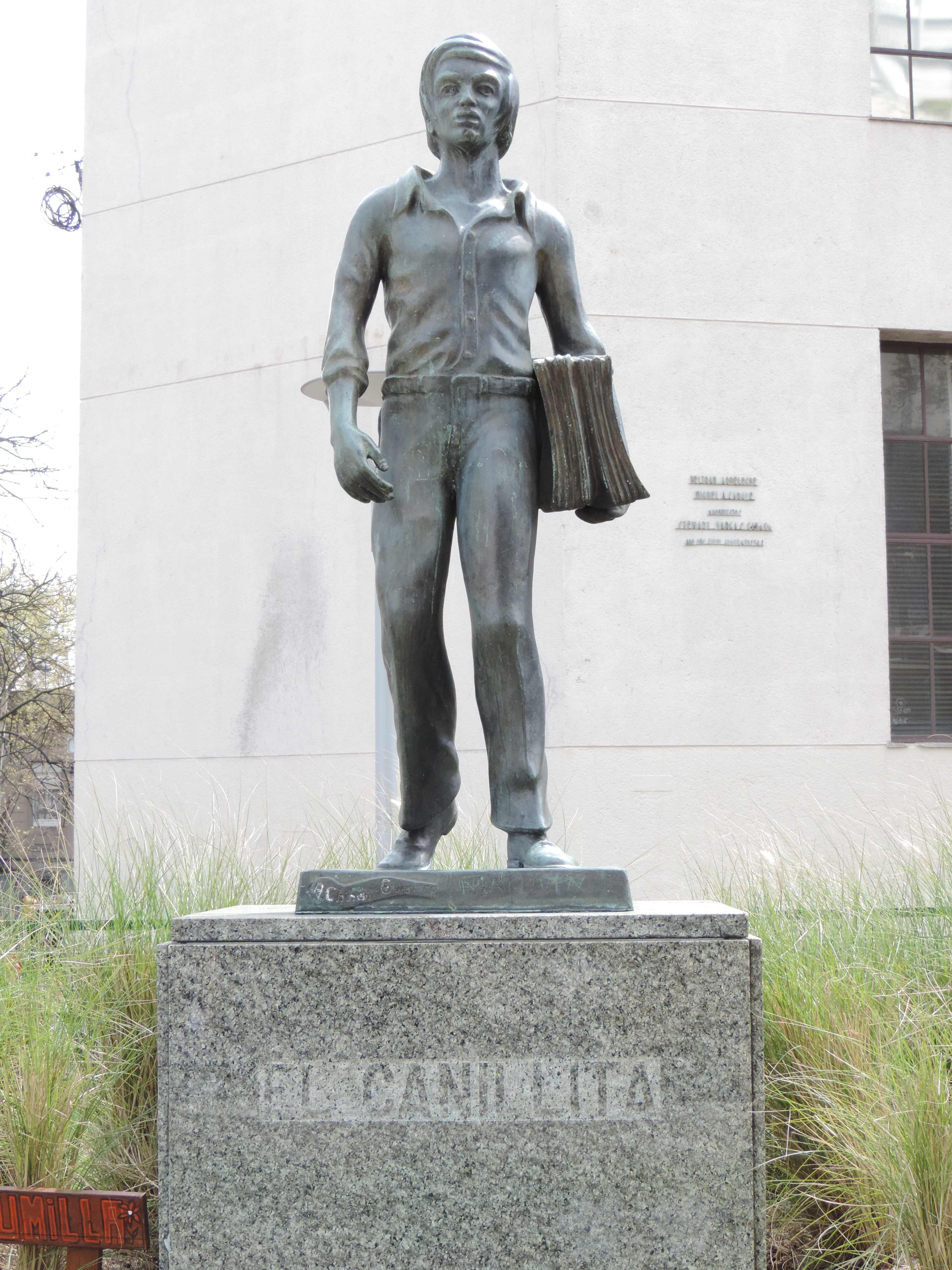 El canillita. Ubicada en el departamento de Montevideo